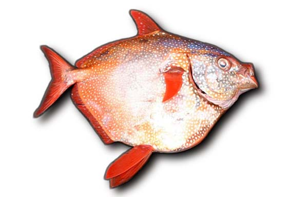 Moonfisch Lampris guttatus